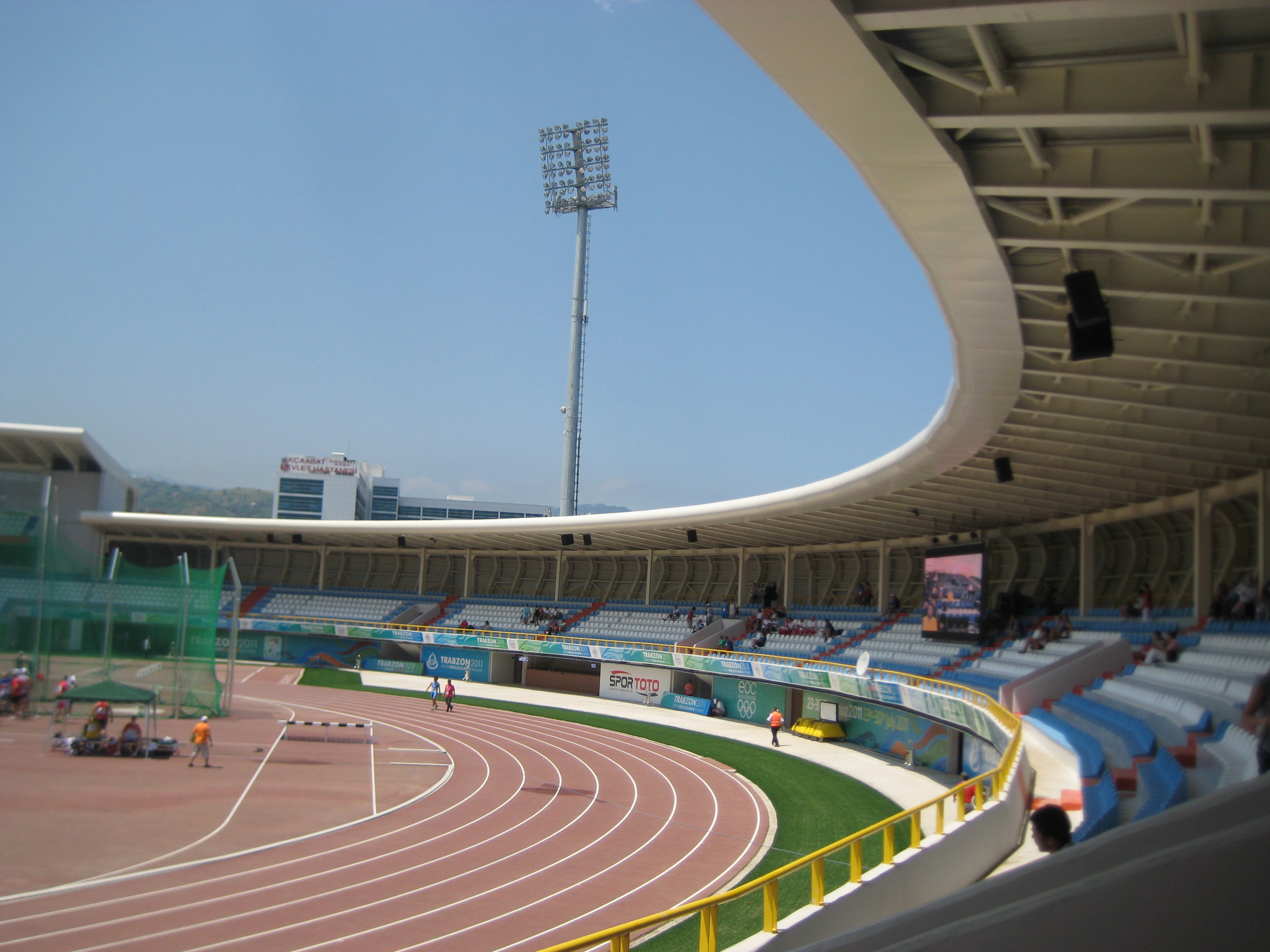 Söğütlü Atletizm Sahası